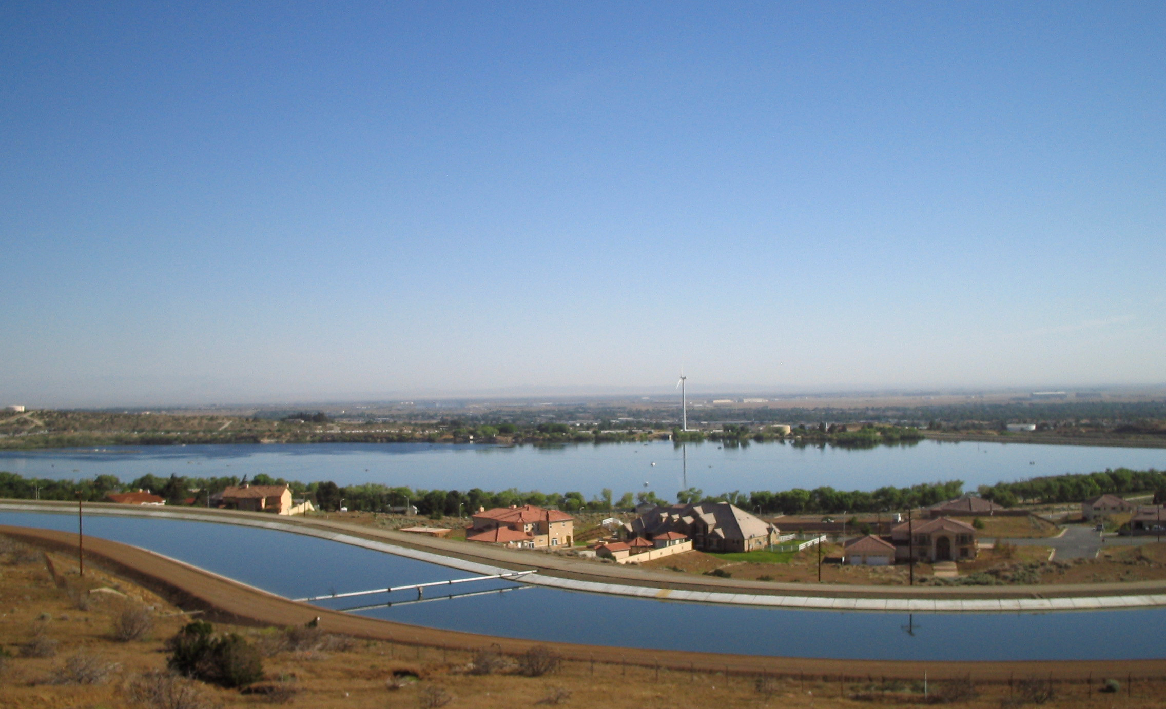 Lake Palmdale, Palmdale, CA